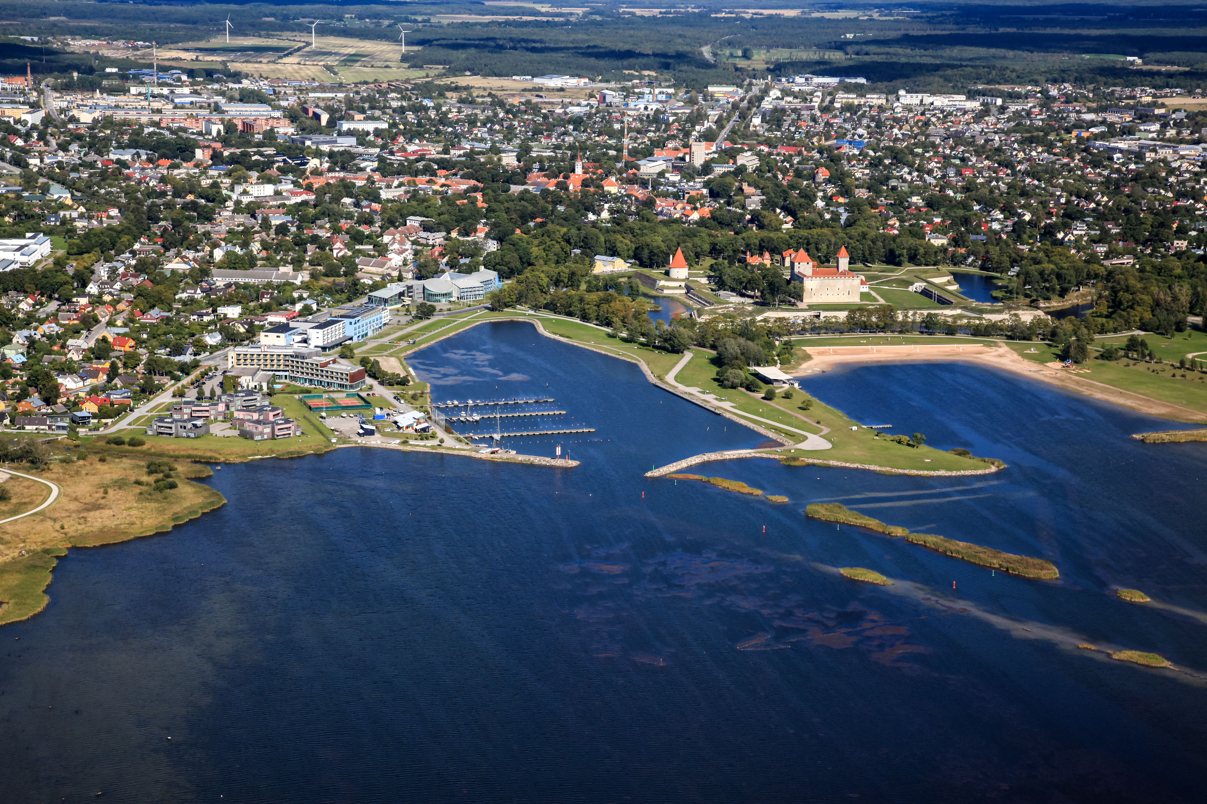 Kuressaare linn ja sadam 2015